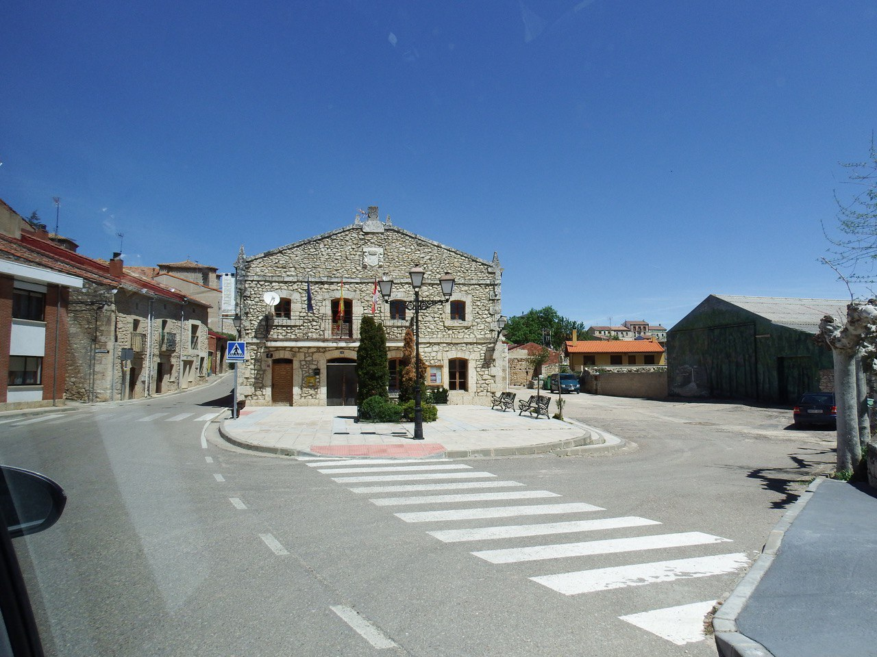 Ayuntamiento de Tubilla del Lago